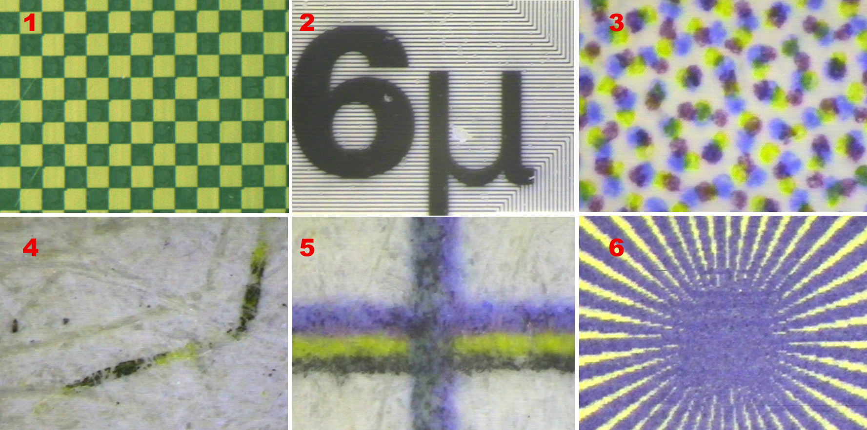 Oberfläche einer Toray-Druckplatte für den wasserlosen Offsetdruck (1). Mikrolinienschar in Dicken bzw. Abständen von 6 µm auf einem reprotechnischen Film (2). AM-Rasterpunkte auf dem Papier im Vierfarbendruck (3). Qualitätsmindernde Fasern in einer Druckpapieroberfläche (4). Qualitätsbewertung des Farbregisters, d.h. der Passgenauigkeit in einem Vierfarbendruck anhand des Übereinanderdrucks von vier Passkreuzen (5). Ein Siemensstern an der Auflösungsgrenze auf einer Druckplatte (6).